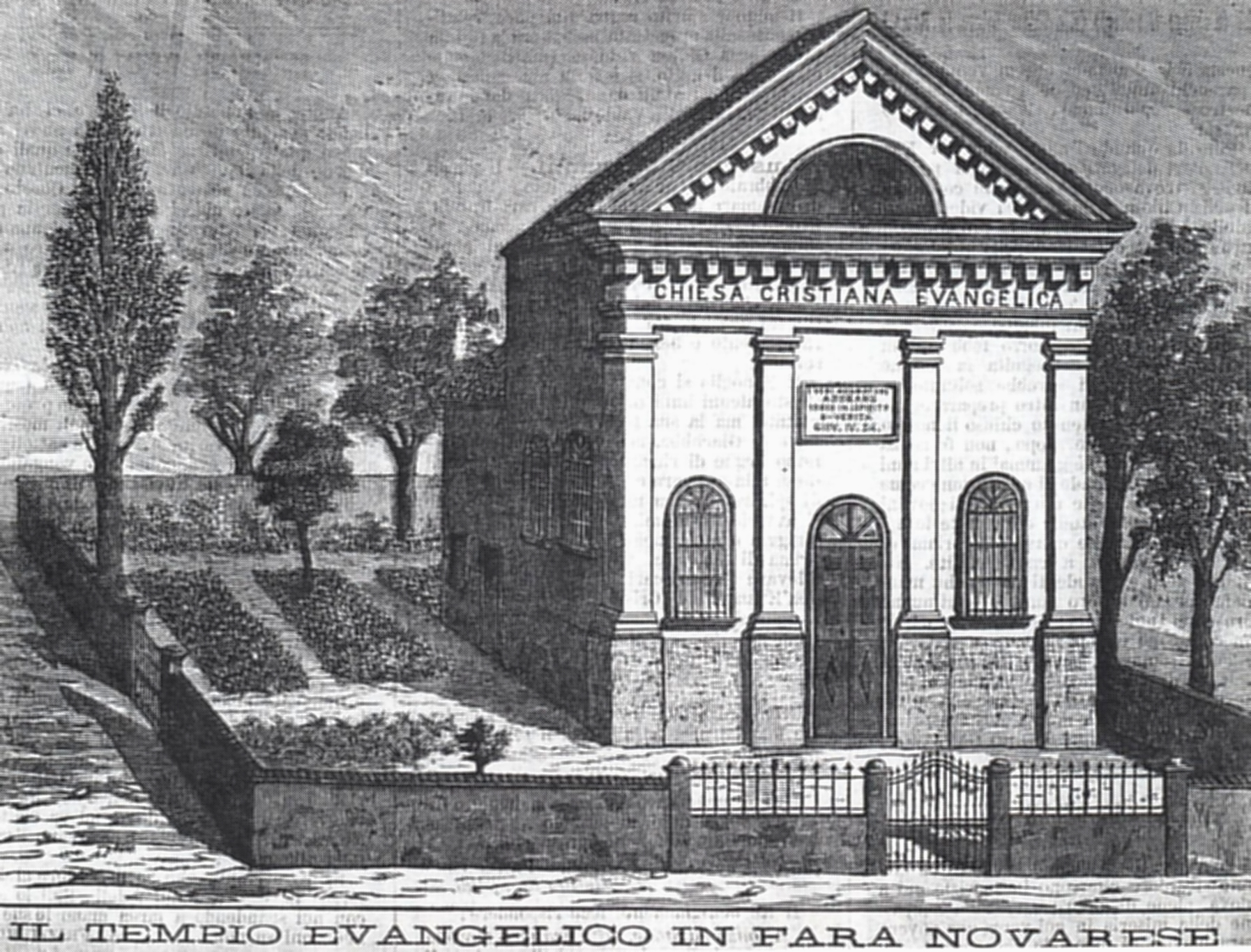 Fara Novarese (NO), Ex Tempio Evangelico, stampa d'epoca.